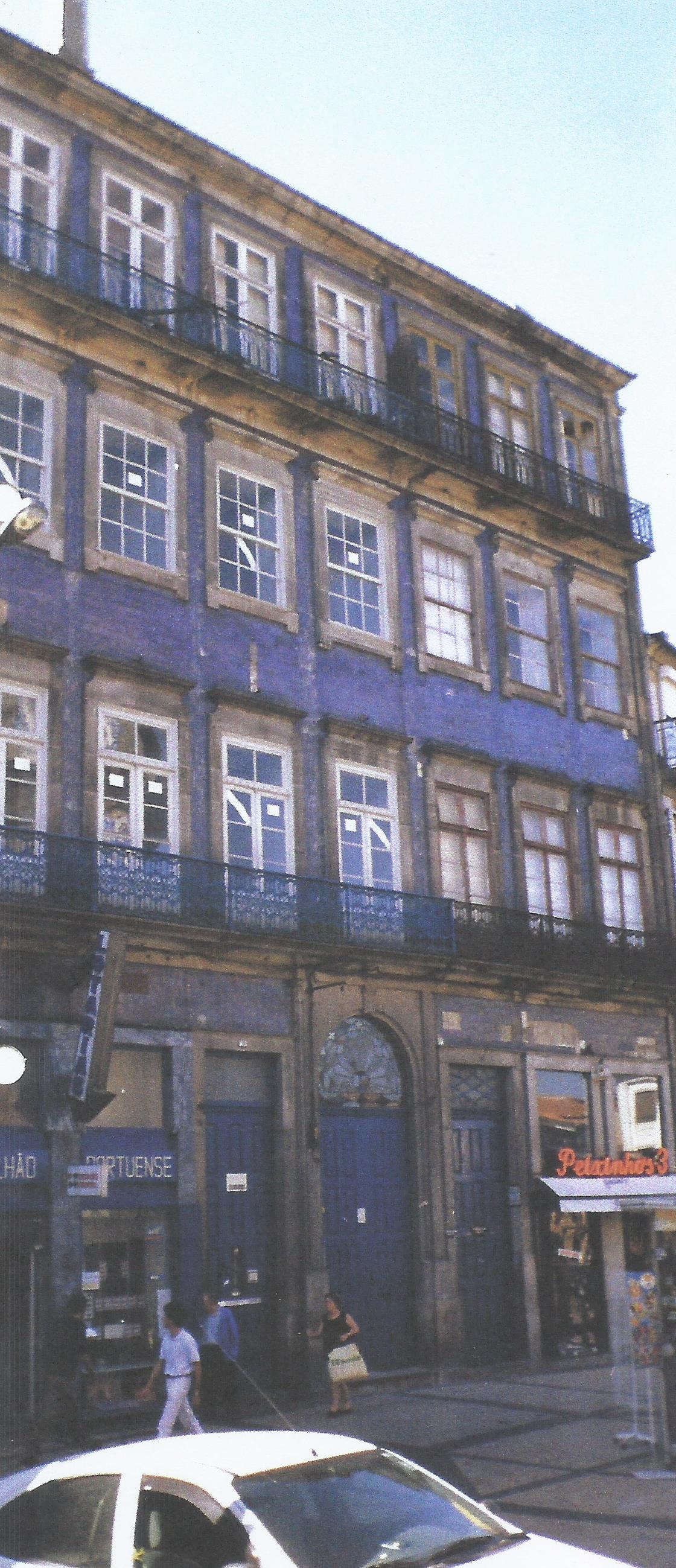 A principal das casas do Barão de Nova Sintra, no Porto. Designada Casa Grande, localiza-se na Praça da Batalha.